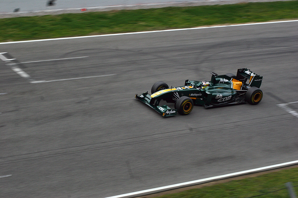 Ricardo Teixeira, Team Lotus